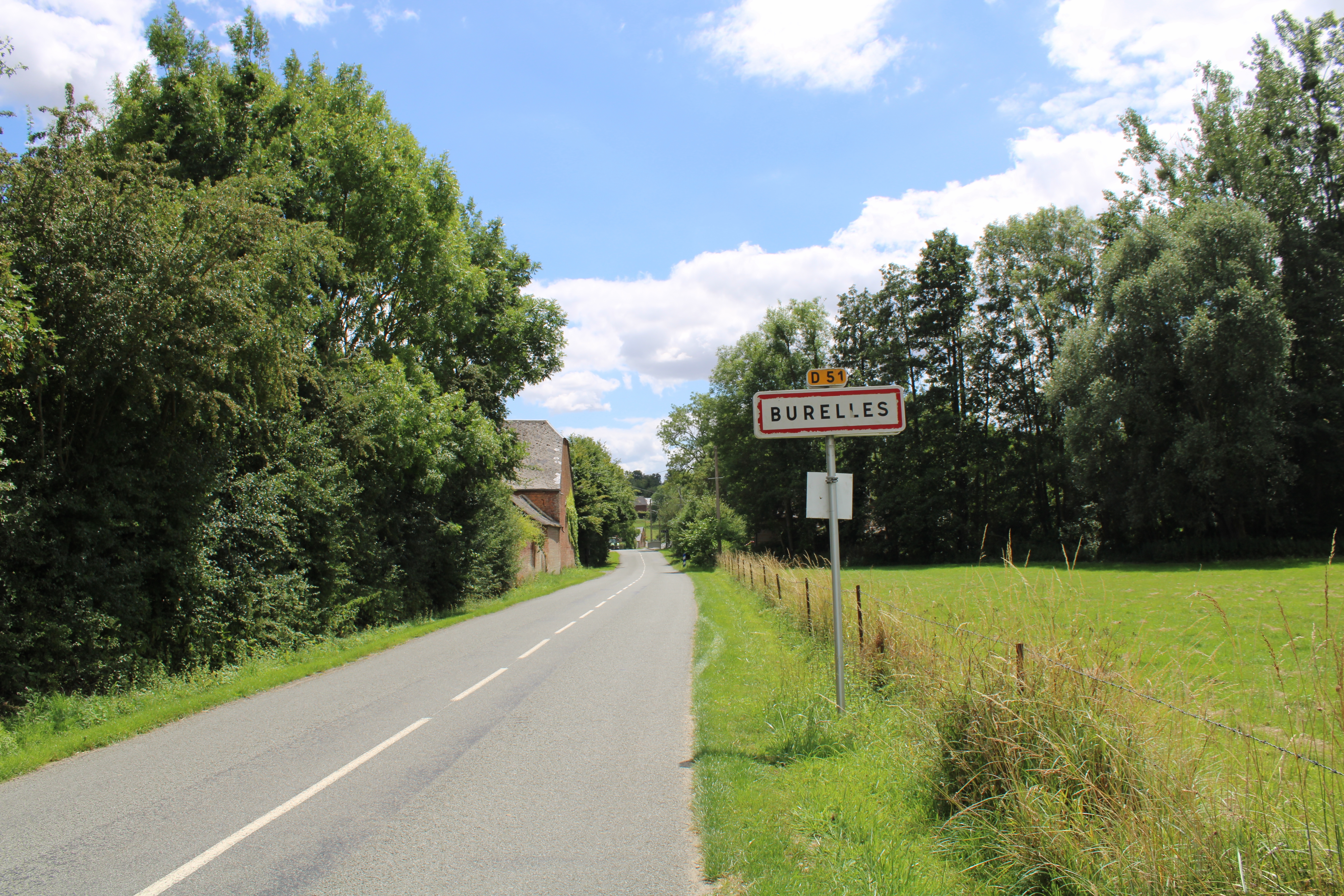 Entrée du village